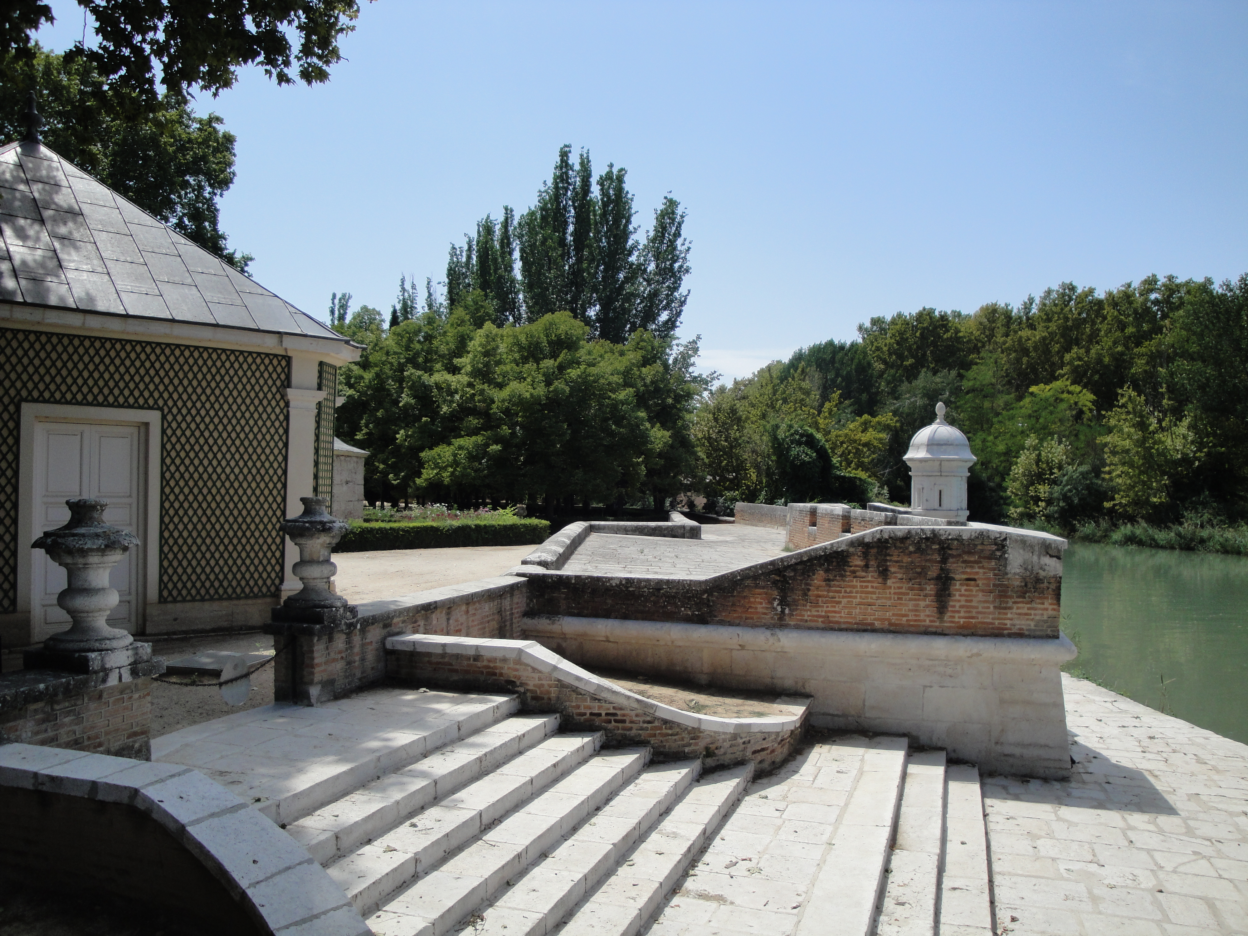 Embarcadero del Rey en el Jardín del Príncipe de Aranjuez